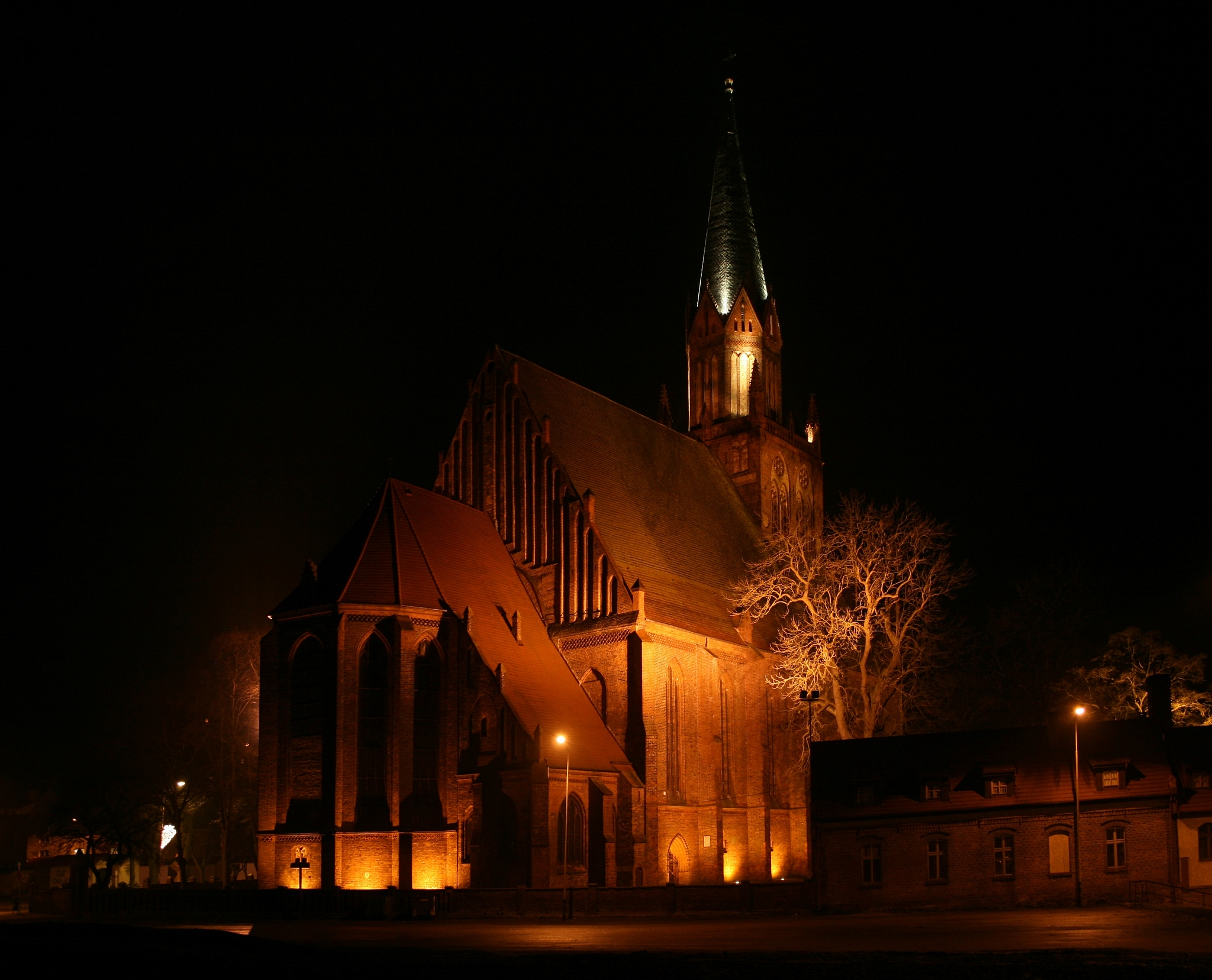 Kościół farny pw. Macierzyństwa Najświętszej Marii Panny w Trzebiatowie, woj. zachodniopomorskie